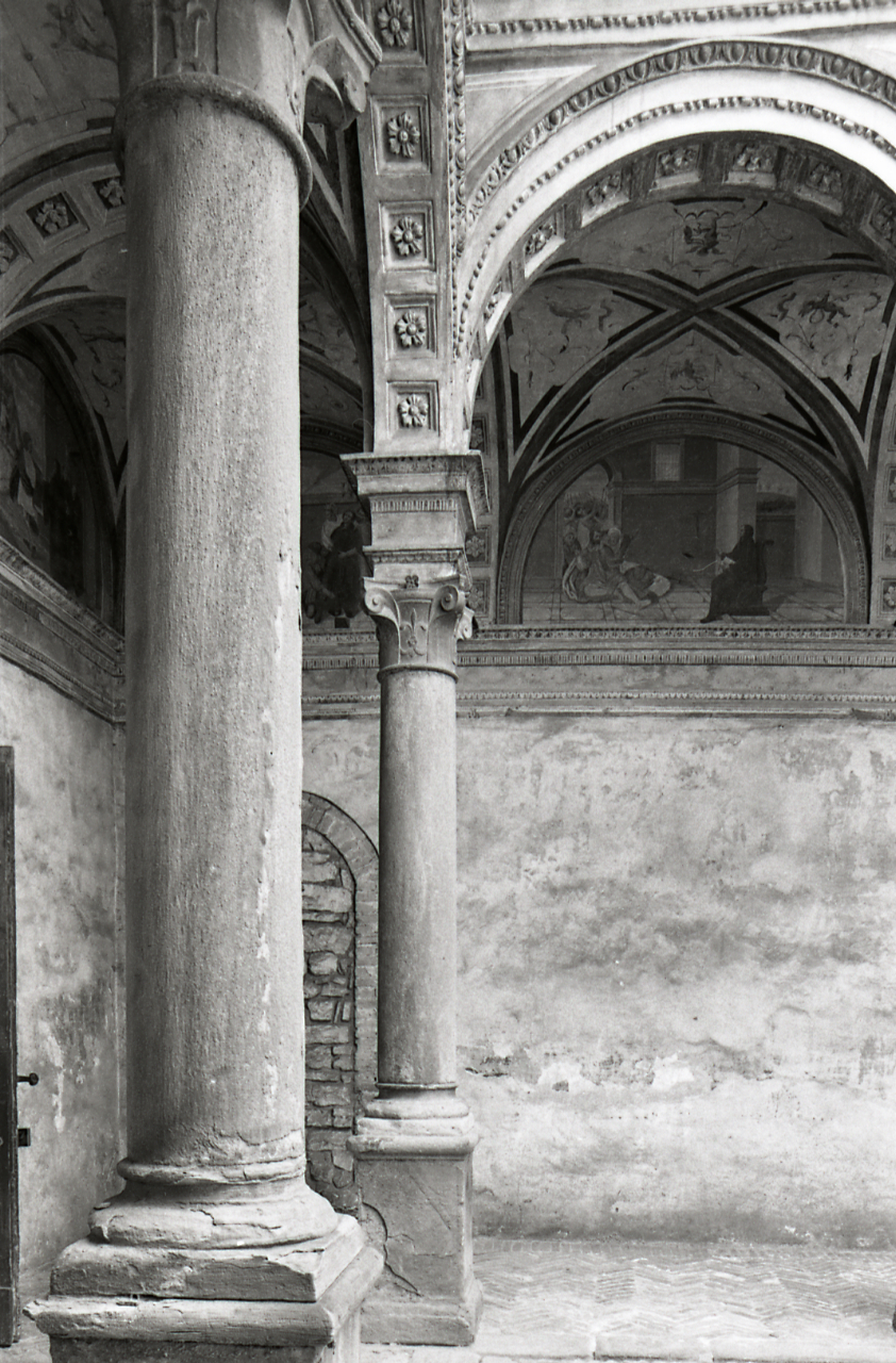 Bergamo alta? Architetture. Edificio (religioso?) non identificato: particolari architettonici e decorativi, pareti e volte affrescati. Servizio fotografico : Bergamo, 1980 / Paolo Monti. - Strisce: 7, Fotogrammi complessivi: 37 : Negativo b/n, gelatina bromuro d'argento/ pellicola ; 35 mm. - ((Sul portanegativi: N[I]K[MA]T-EL FP4. - Confronta scheda 3462Lpbn01A-37A. - Occasione: Documentazione per la pubblicazione: Fumagalli Alberto, "Bergamo: origini e vicende storiche del centro antico", Milano, Rusconi immagini, 1981. - di Paolo Monti: IV. Commesse/ Fattura n. 15/ Vostro volume illustrato Bergamo Alta (1980/05/18), presso Archivio Paolo Monti. Servizio fotografico in b/n per le illustrazioni del volume. Alla Società Rusconi vengono ceduti tutti i diritti di riproduzione anche per le eventuali coedizioni estere. - Fonte: Monografia di Fumagalli, Alberto: Bergamo: origini e vicende storiche del centro antico, Milano, Rusconi immagini (1981). - Fonte: Agenda di Paolo Monti: Nikon Leika 3001-/ Monti 1978 (1978-1982), presso Archivio Paolo Monti. - Fonte: Fattura